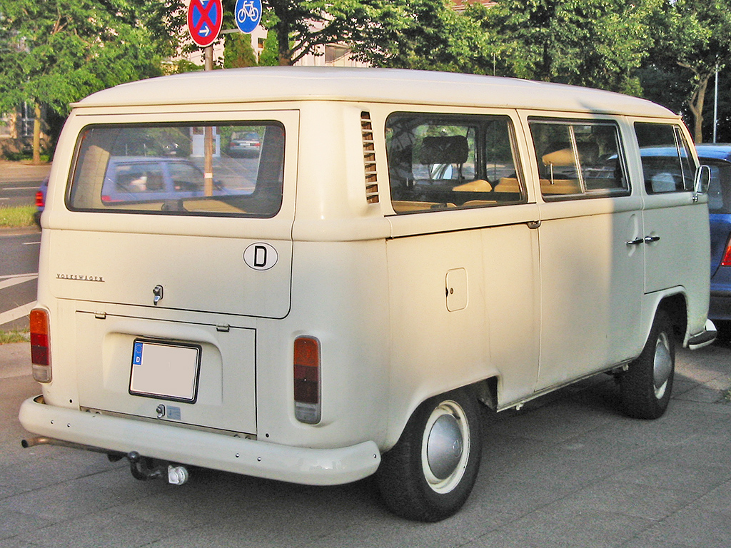 VW Transporter, T2 Zwischenmodell